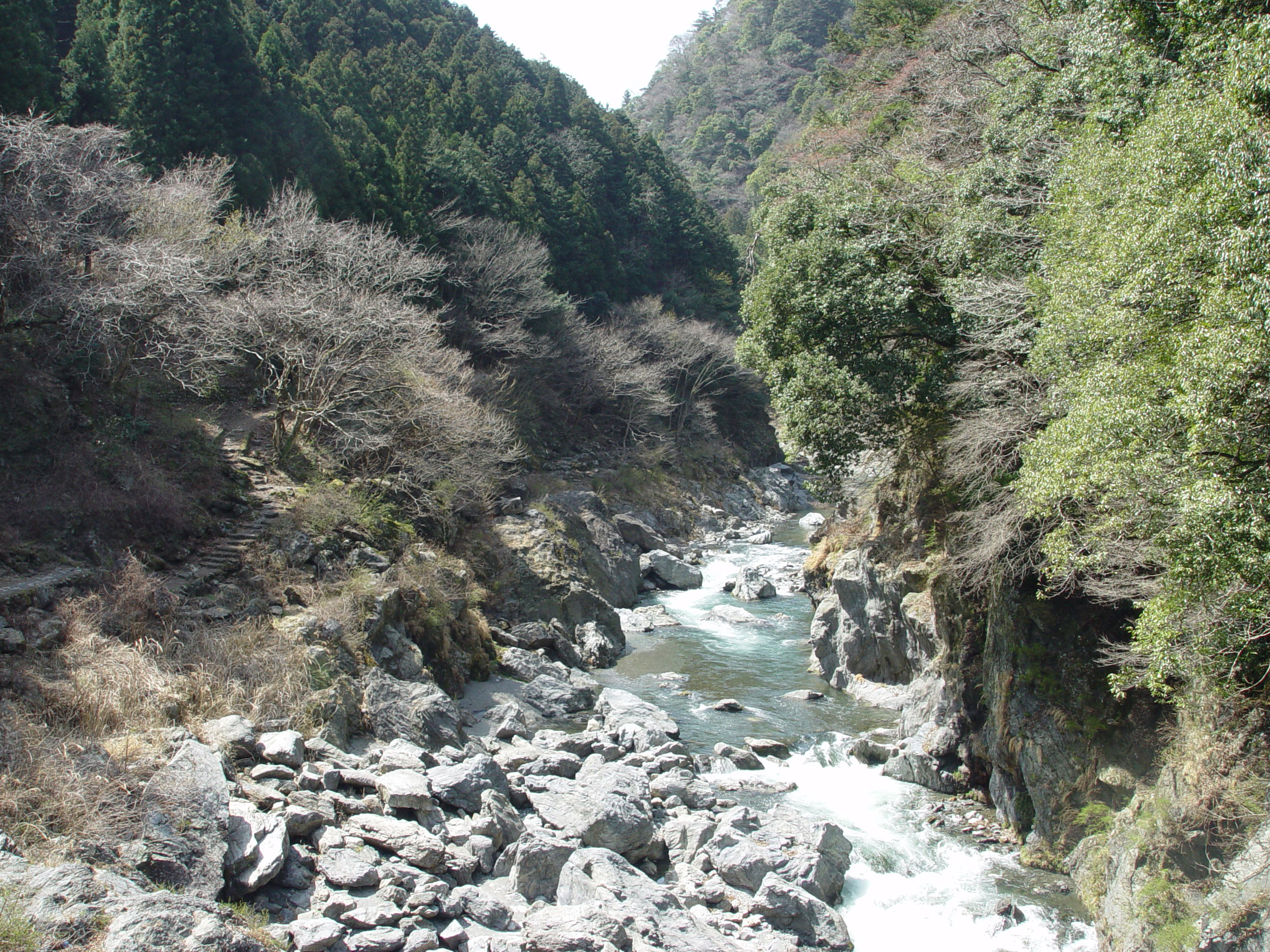 Hatonosu Keikoku valley ja: 鳩ノ巣渓谷、多摩川